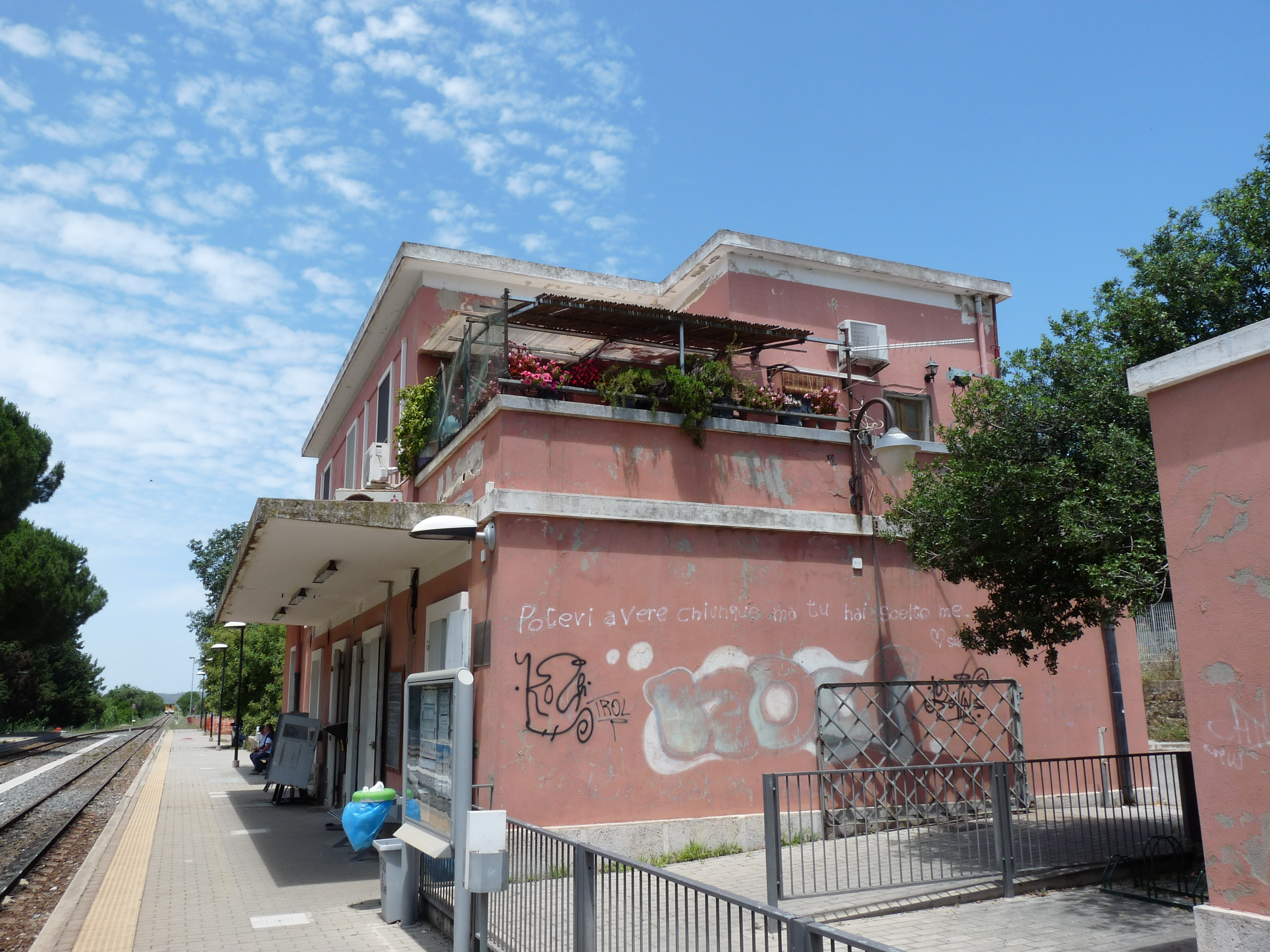 Het bewoonde stationsgebouw van Dolianova